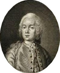 Jan Křtitel Antonín Boháč (1724-1768, lékař a přírodovědec